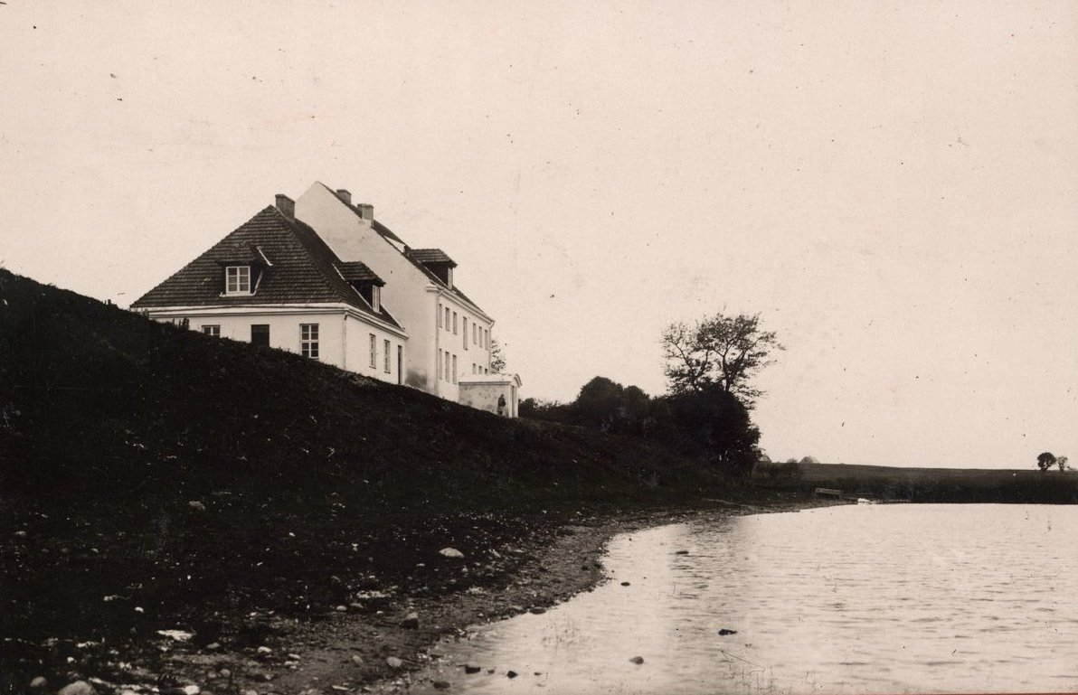 Budynek Niższej Żeńskiej Szkoły Rolniczej Sejmiku Suwalskiego w Kukowie - widok od strony stawu.